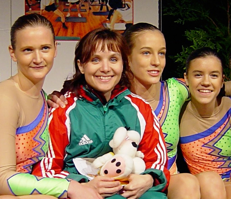 Szloboda Éva a tanitványokkal